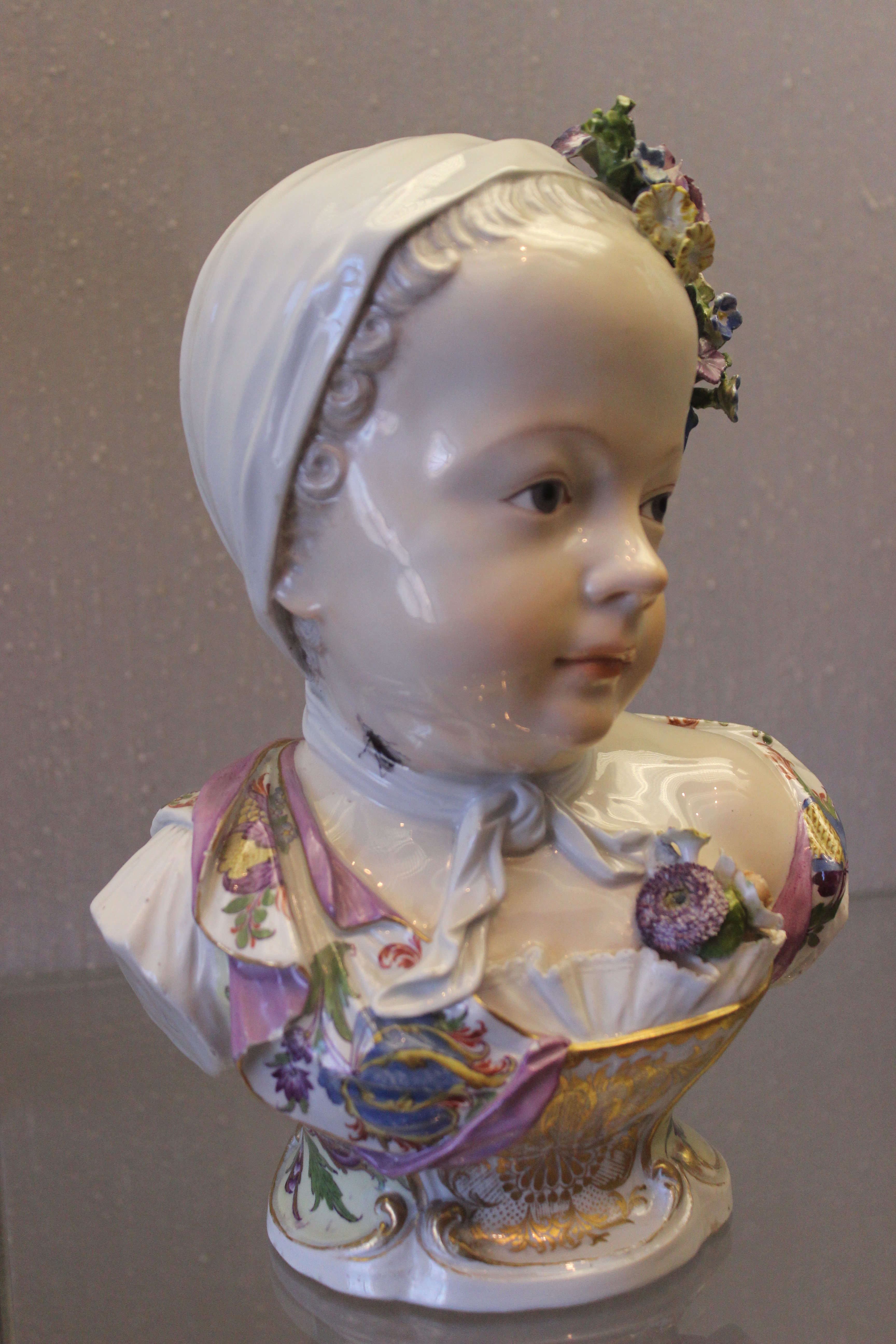 Johann Joachim Kaendler. Busto en porcelana de la princesa Marie Zéphyrine. Philadelphia Museum of Art.